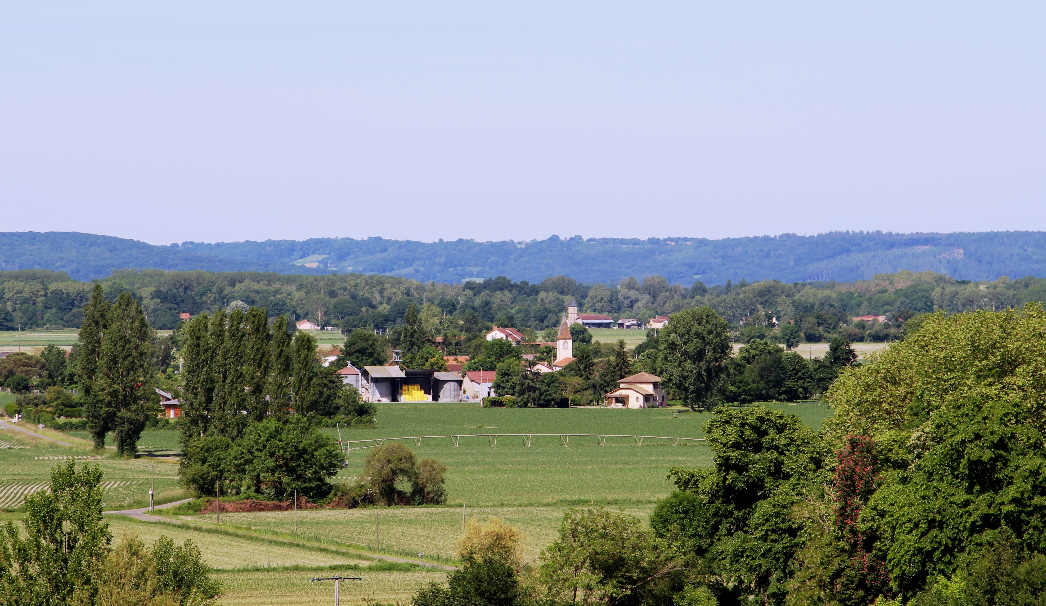 Ansost (Hautes-Pyrénées)